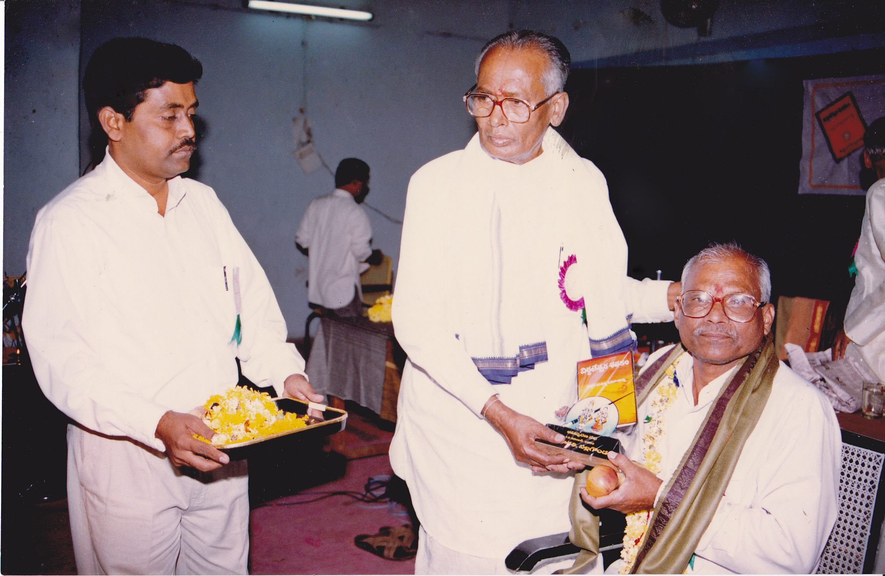 జానపద సాహిత్య పితామహులు ఆచార్య శ్రీ బిరుదురాజు రామరాజు గారు ఆచార్య కూరెళ్ళ గారిని సన్మానిస్తున్న దృష్యం